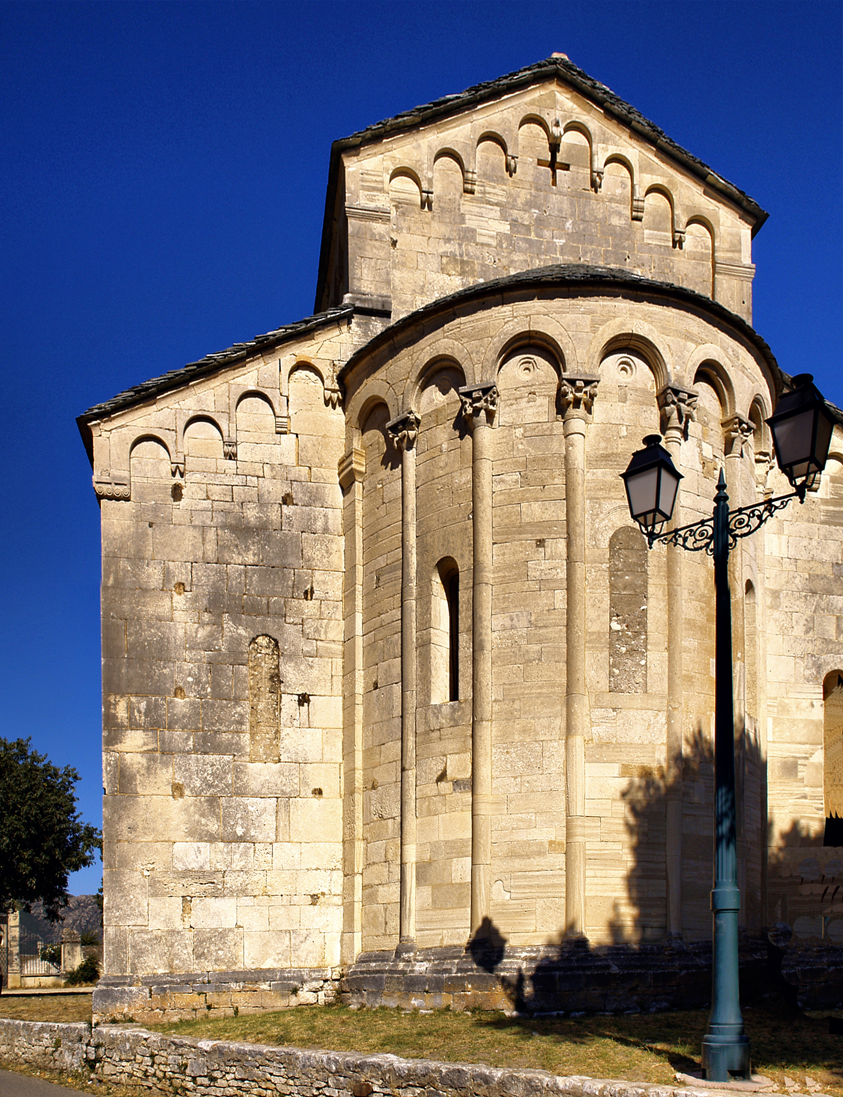 Saint-Florent (Corse) - Cathédrale du Nebbiu - Abside